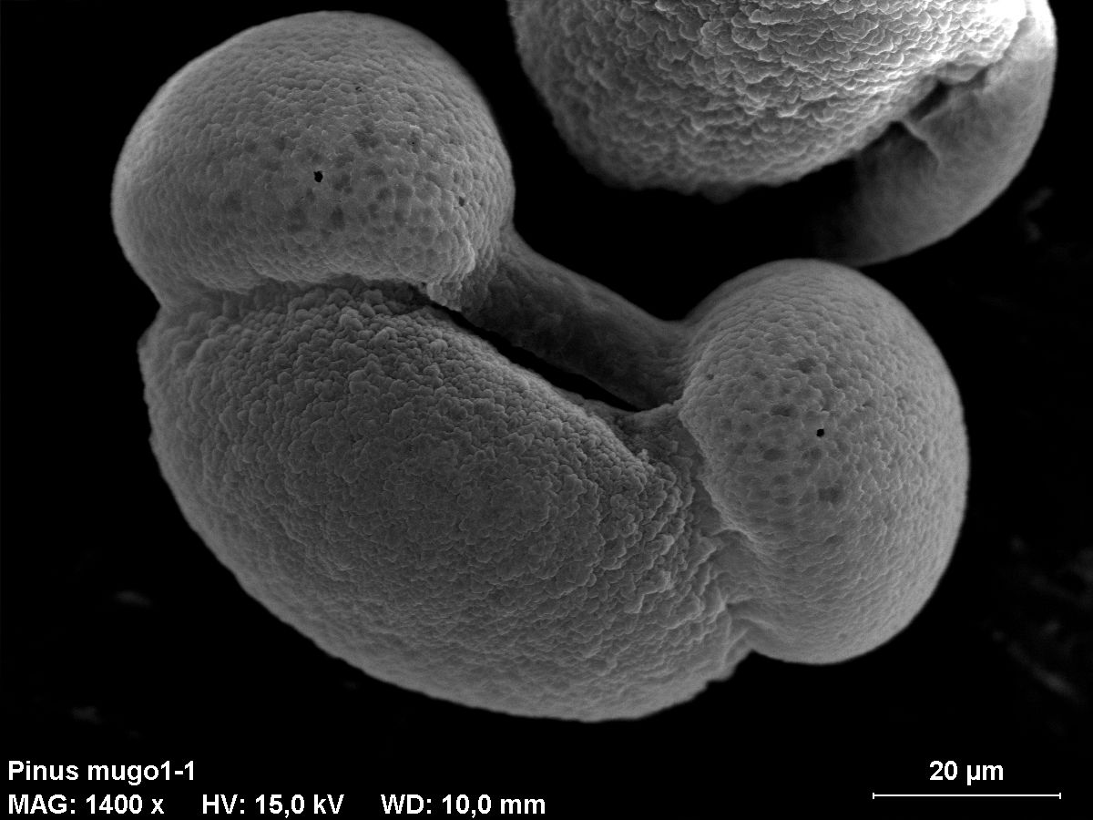 Pinus mugo - Pollen (Rasterelektronenmikroskop)